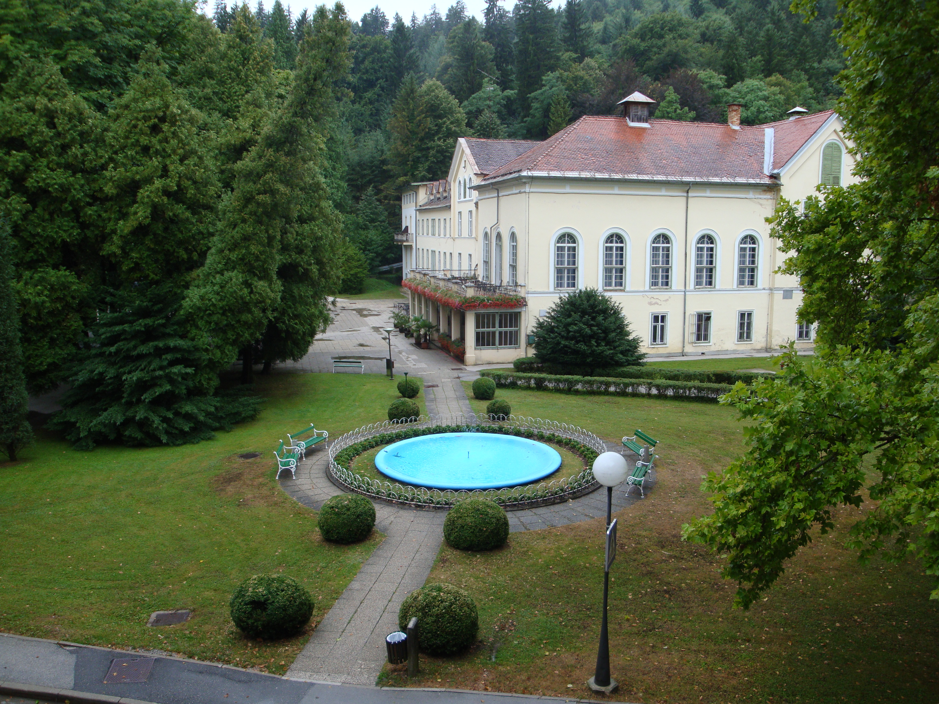 Zgradba zdraviliškega doma v Dobrni, Slovenija